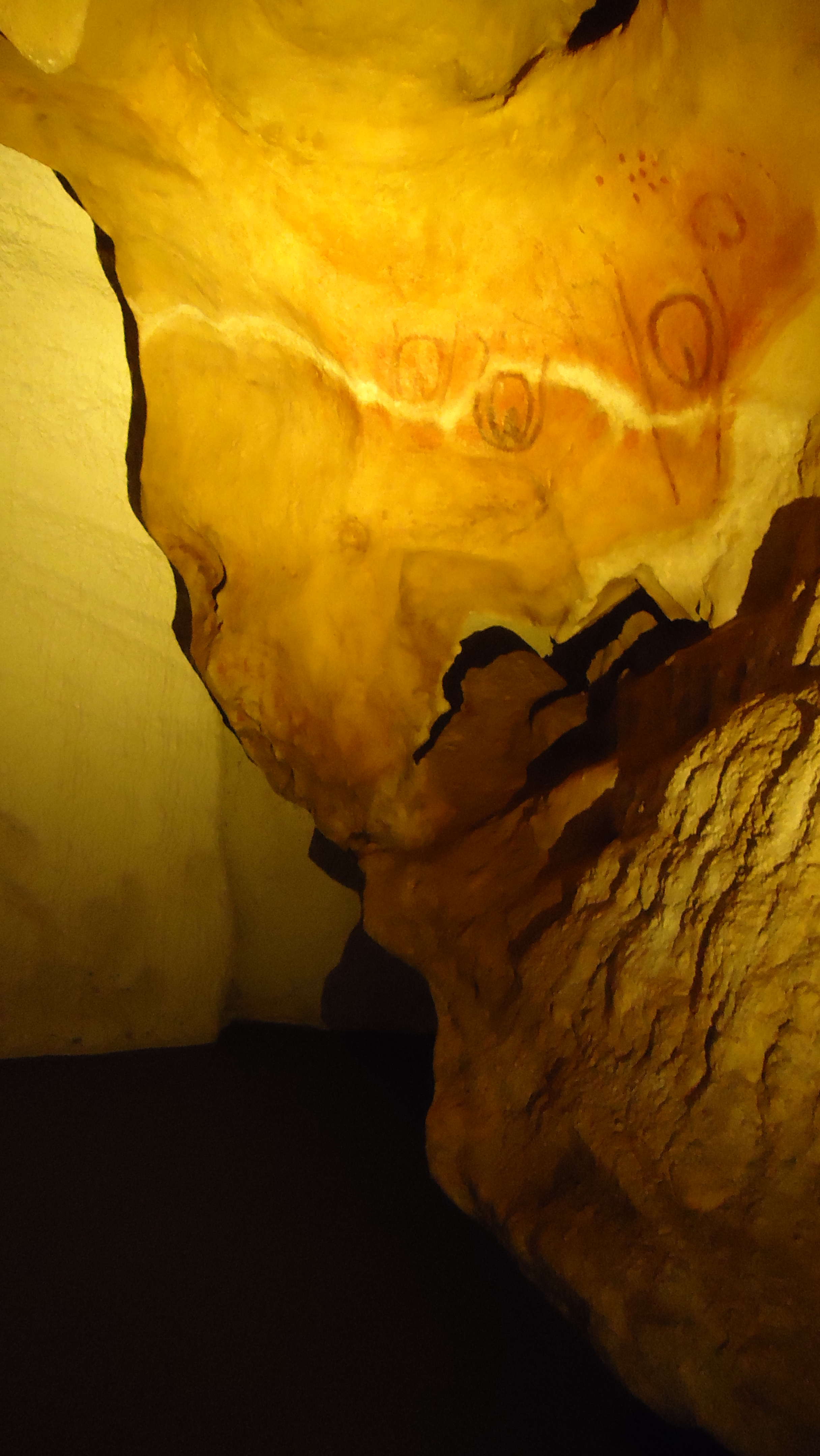 Interior del Centro de interpretación de la Cueva de Tito Bustillo, Galería de las Vulvas. Ribadesella, Asturias